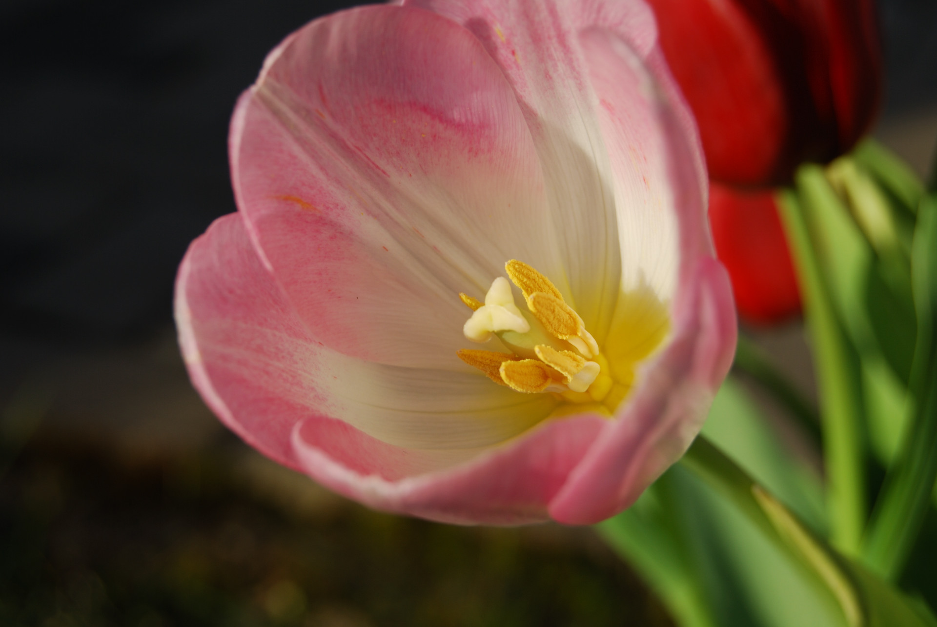 Inside a tulip, close-up view